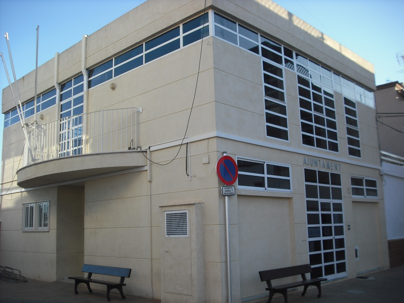 Ayuntamiento de Emperador